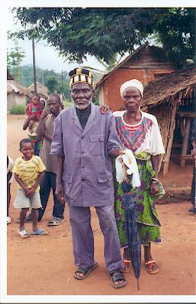 Monsieur GOUET BATIGBEU, chef du village de Mantongouiné.